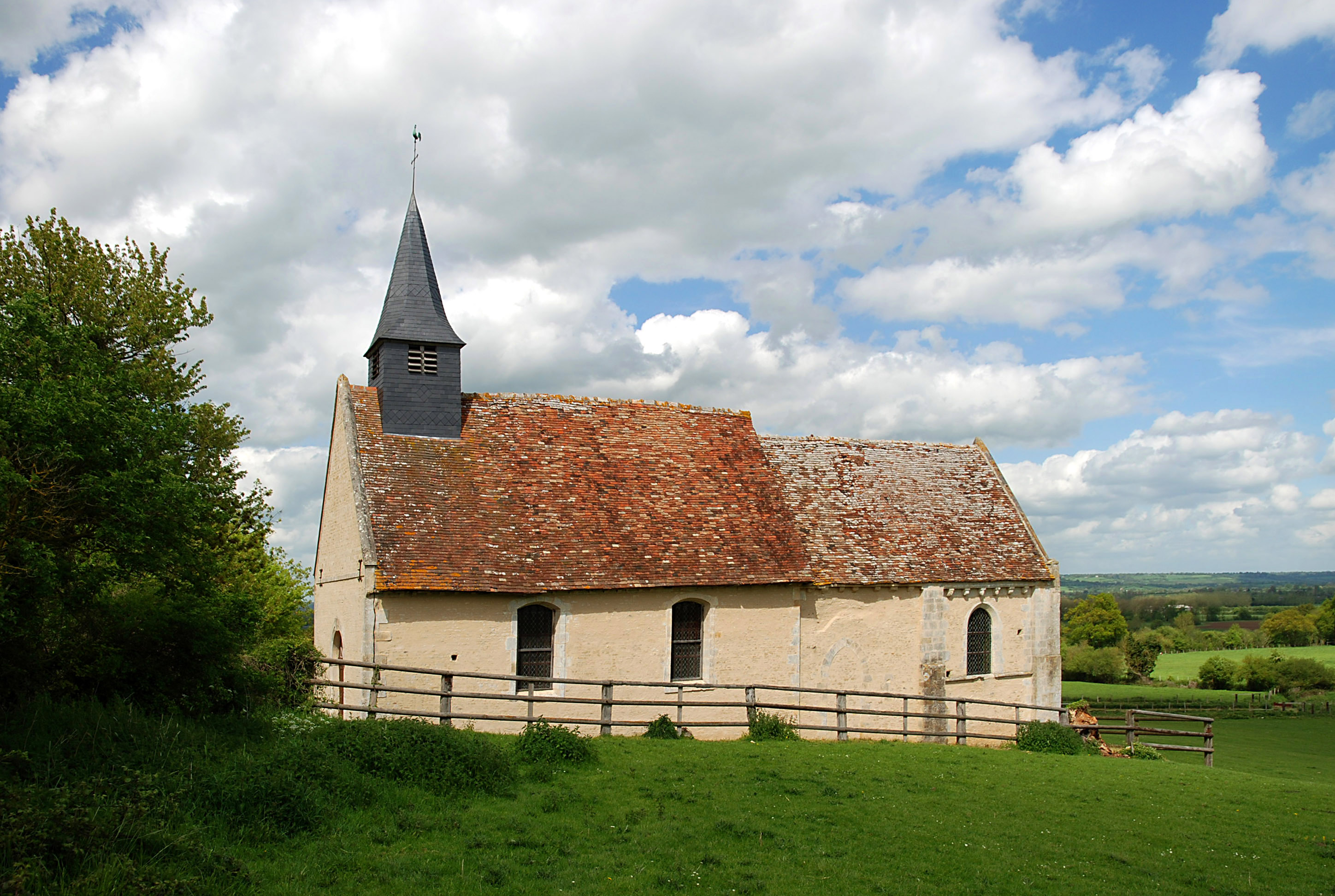 Biéville-Quétiéville (Calvados)